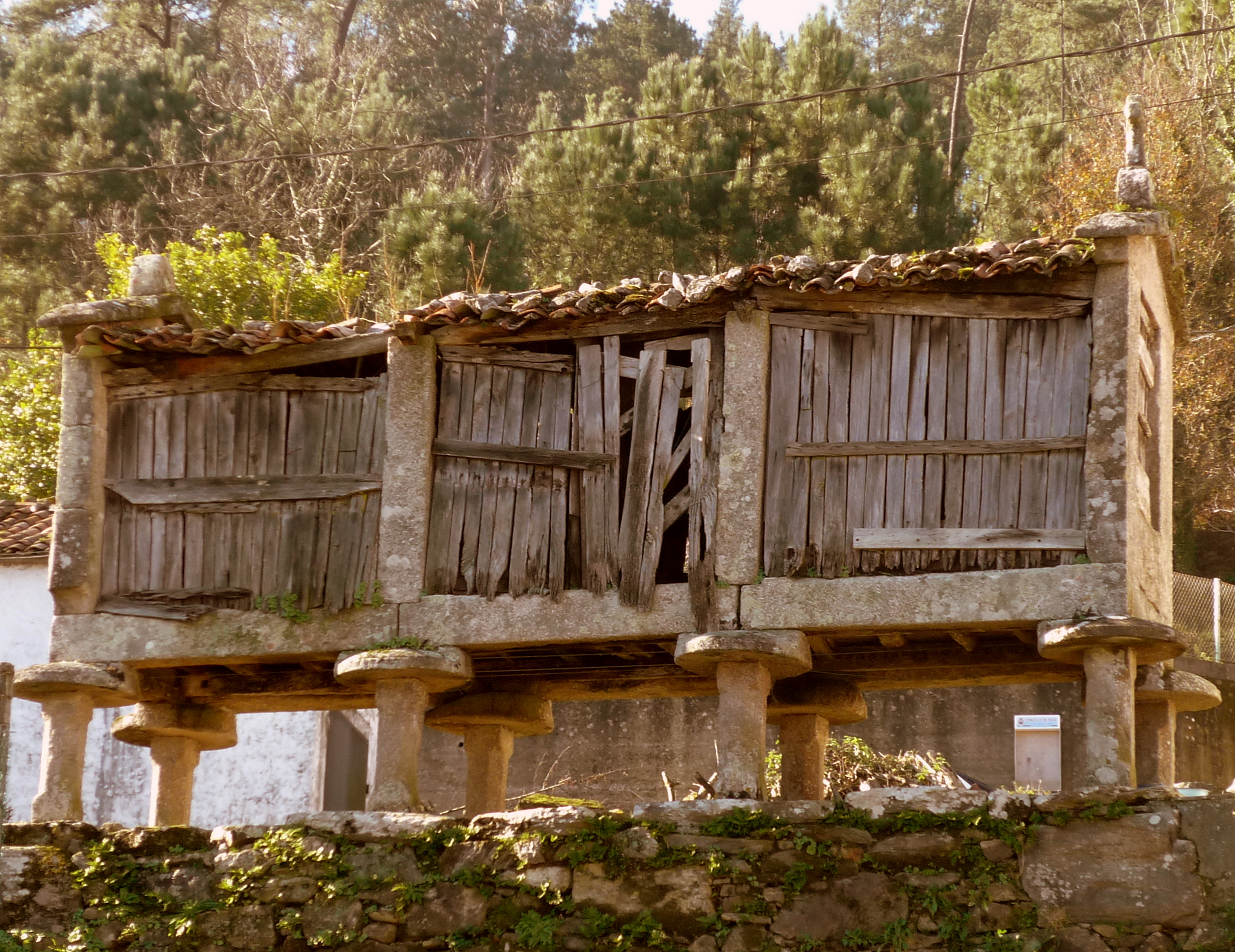 Hórreo, Sobreviñas, Argalo, Noia